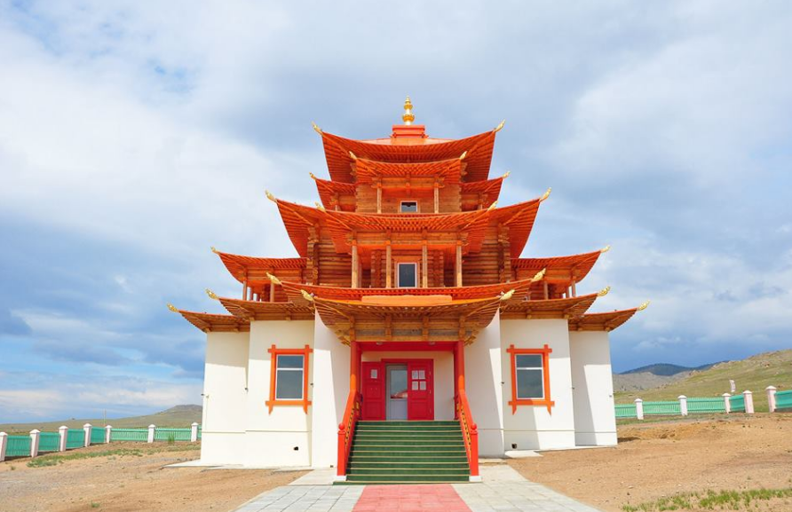 Atsaysky datsan in Buryatia, Selenga area 2